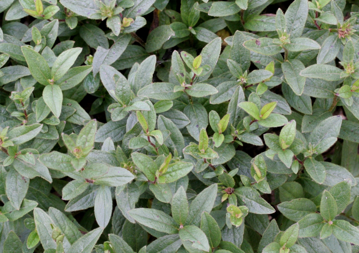 Inula_hirta (Enula scabra) Località : Giardino Botanico Alpino "Giangio Lorenzoni", Pian Cansiglio, Tambre d'Alpago (BL), 1000 m s.l.m.